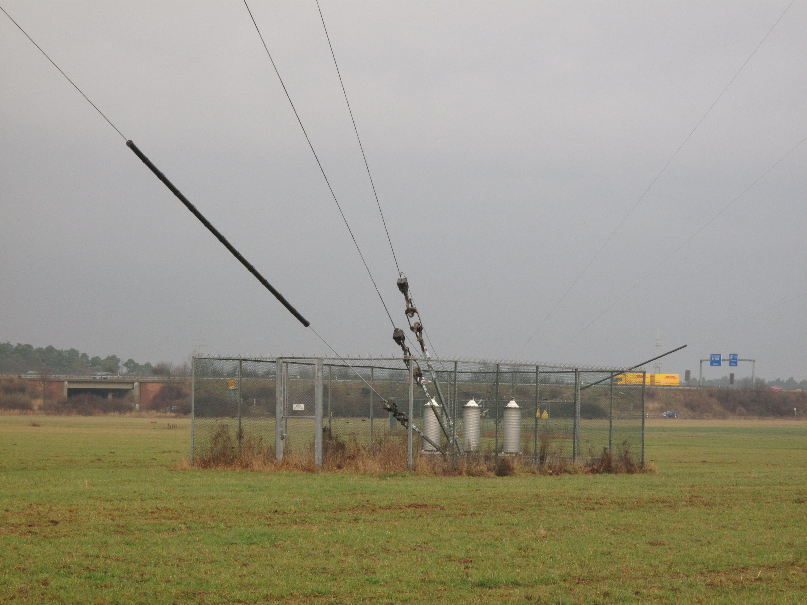 Abspanndrähte des westlichen Sendemasten des HR-Senders Weiskirchen, im Hintergrund die Autobahn A3.